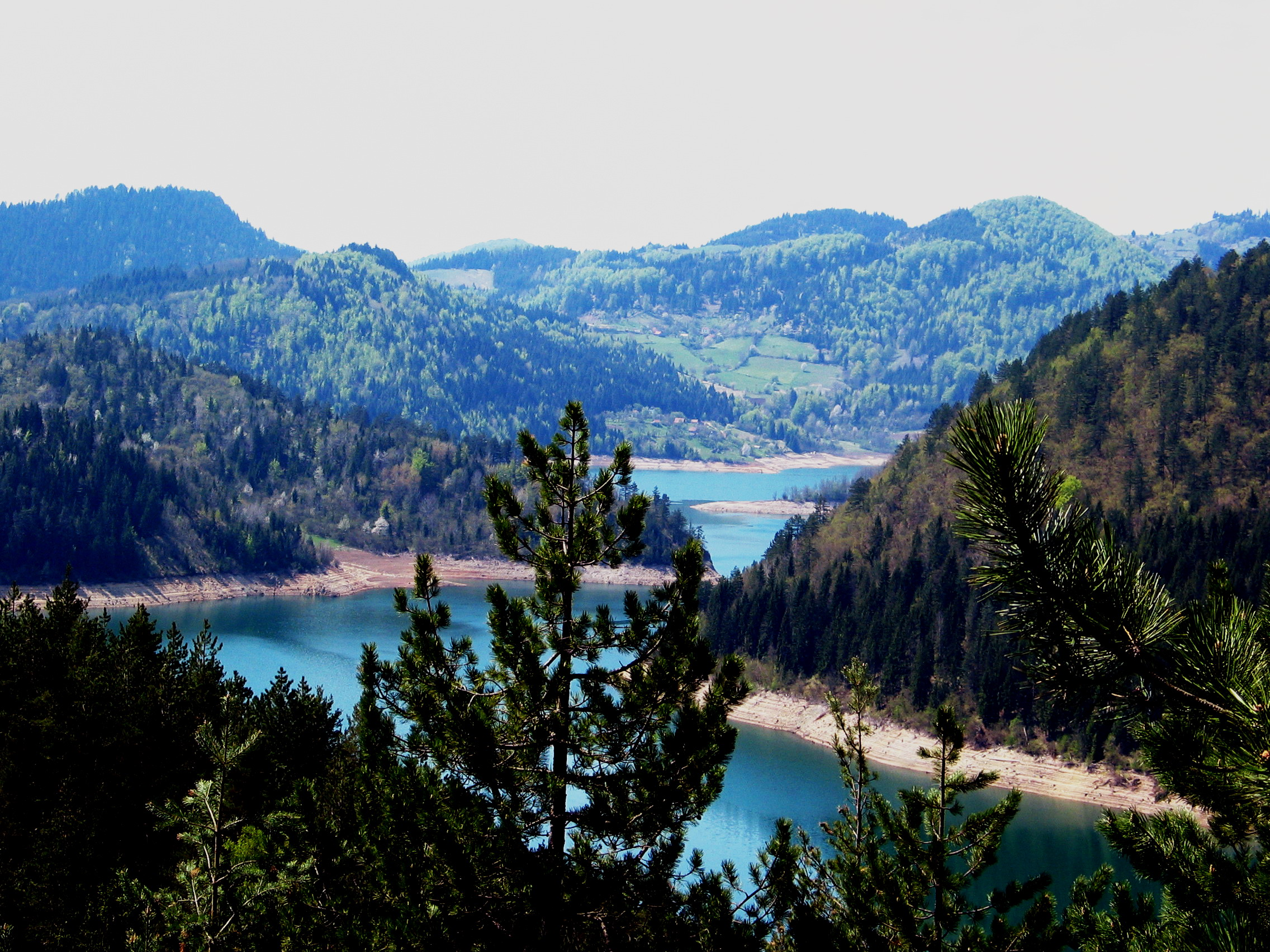 језеро Заовине на планини Тари, Западна Србија, аутор Голдфингер